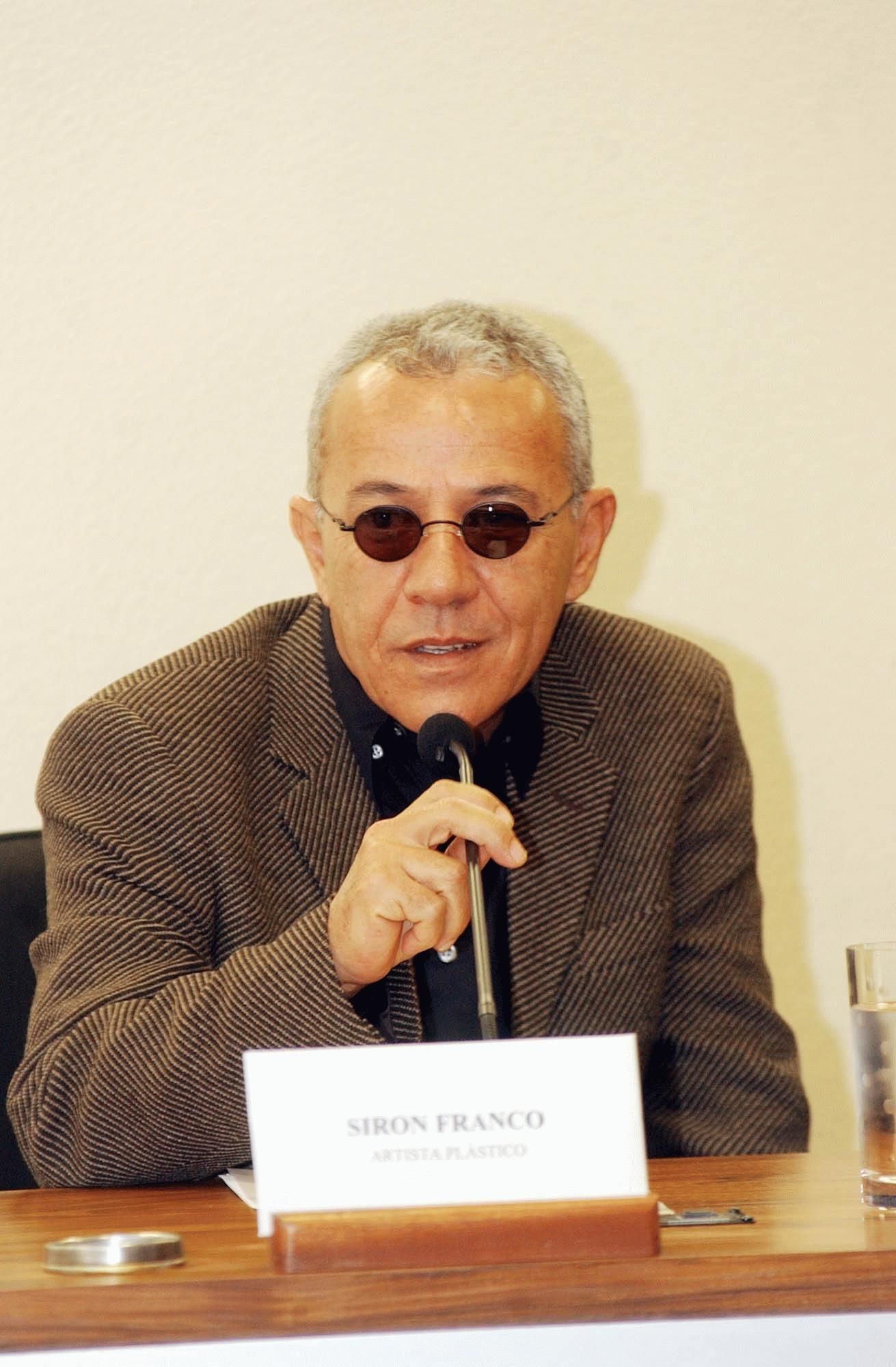 O artista plástico brasileiro Siron Franco.